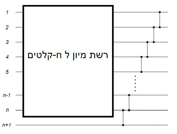 רשת מיון בנוייה בהשראת מיון הכנסה